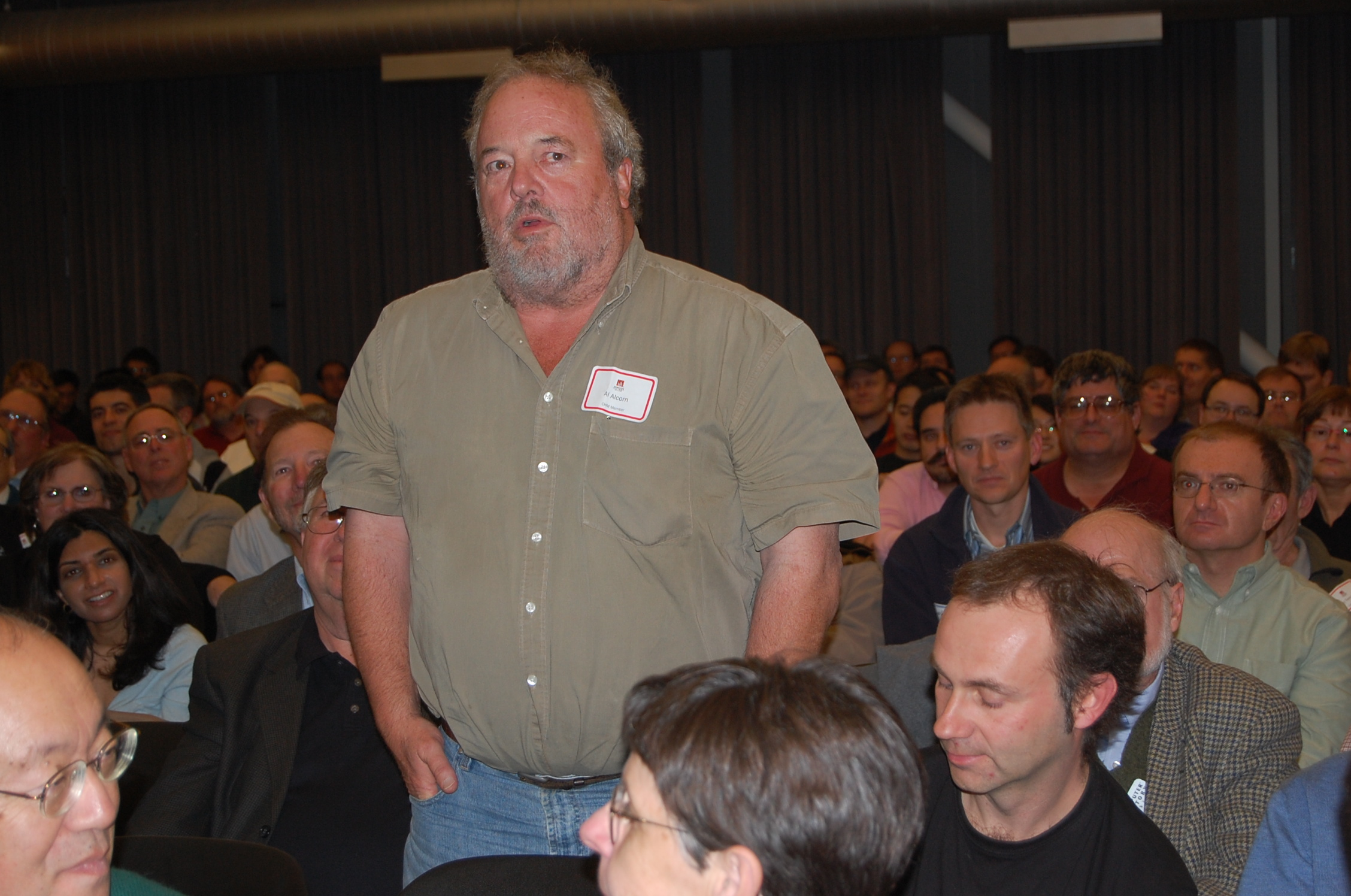 Al Alcorn 2007